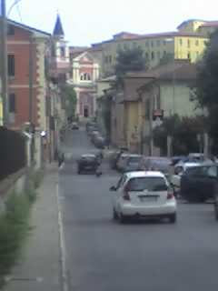 Facciata della Chiesa della Madonna del Monte nei pressi dell'ospedale di Massa